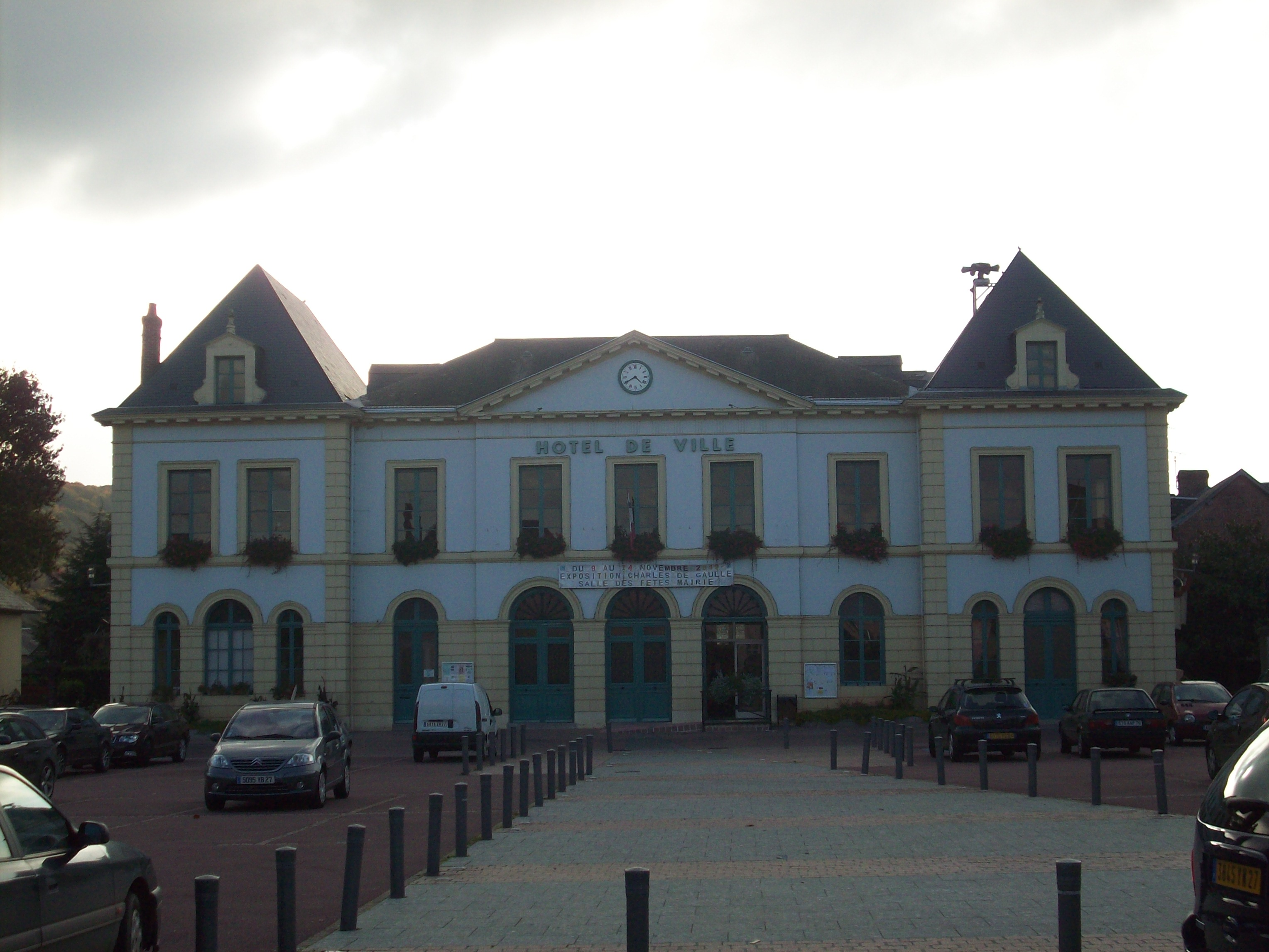 Mairie de Fleury-sur-Andelle.